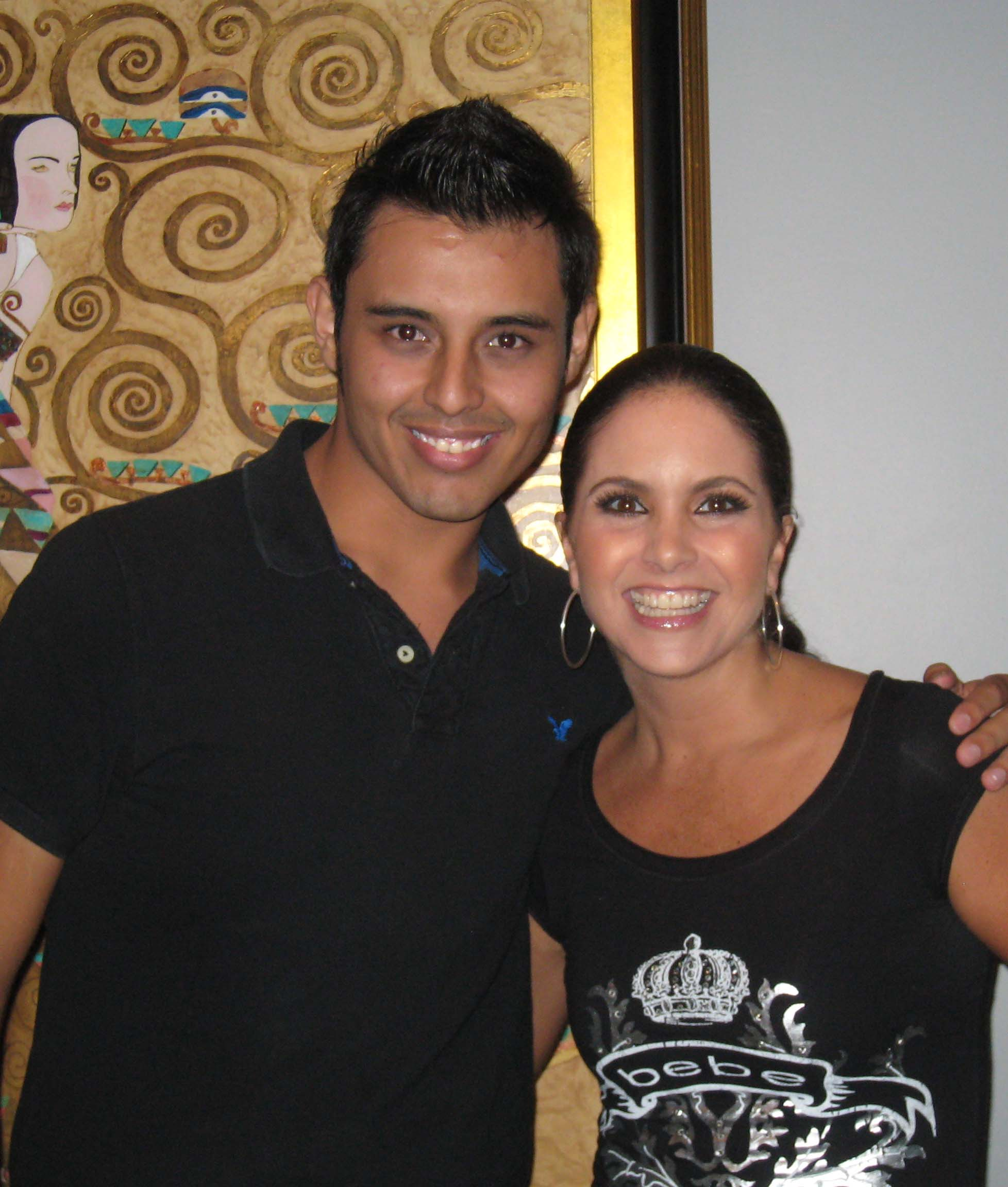 Lucero Hogaza y su amigo Emmanuel Guzman